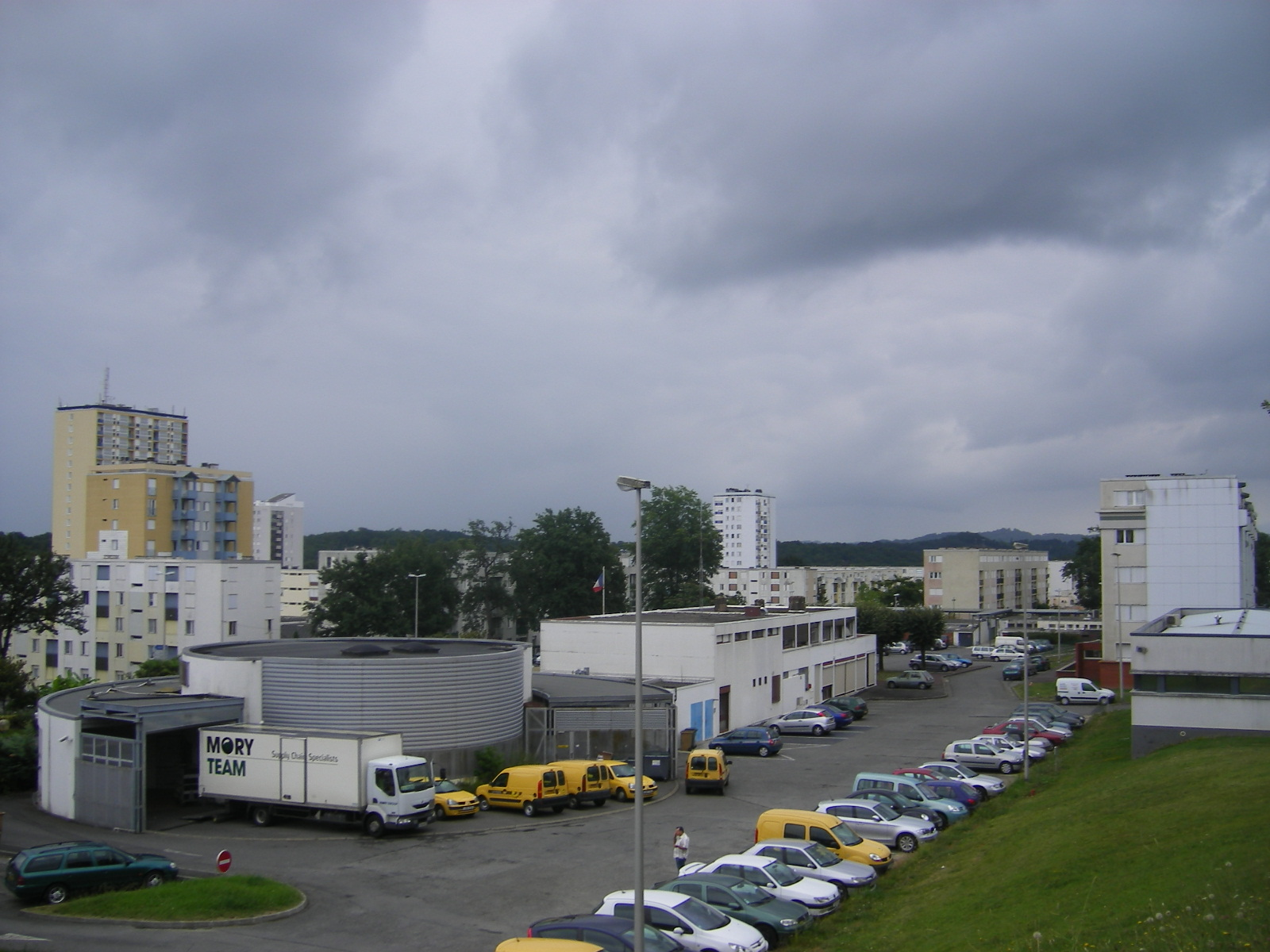 Mourenx